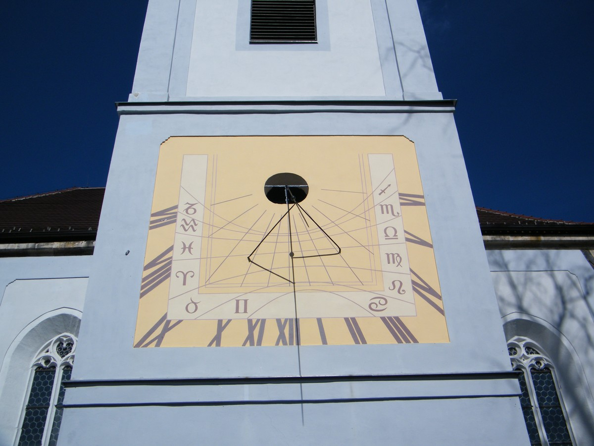 Kostel svaté Anny v Jedlce